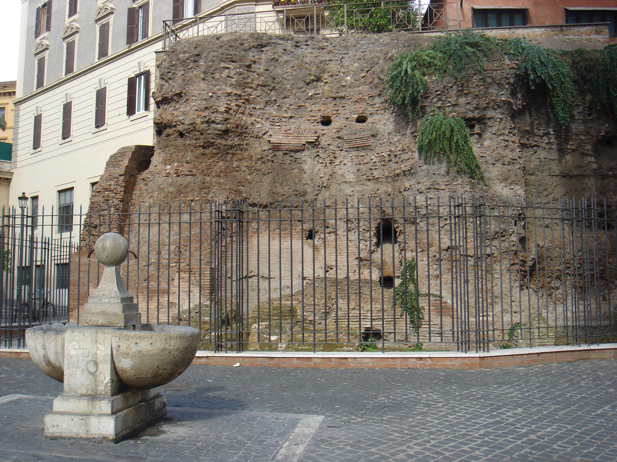 Roma, piazza Iside. Resti del tempio d'Iside e fontana (moderna).